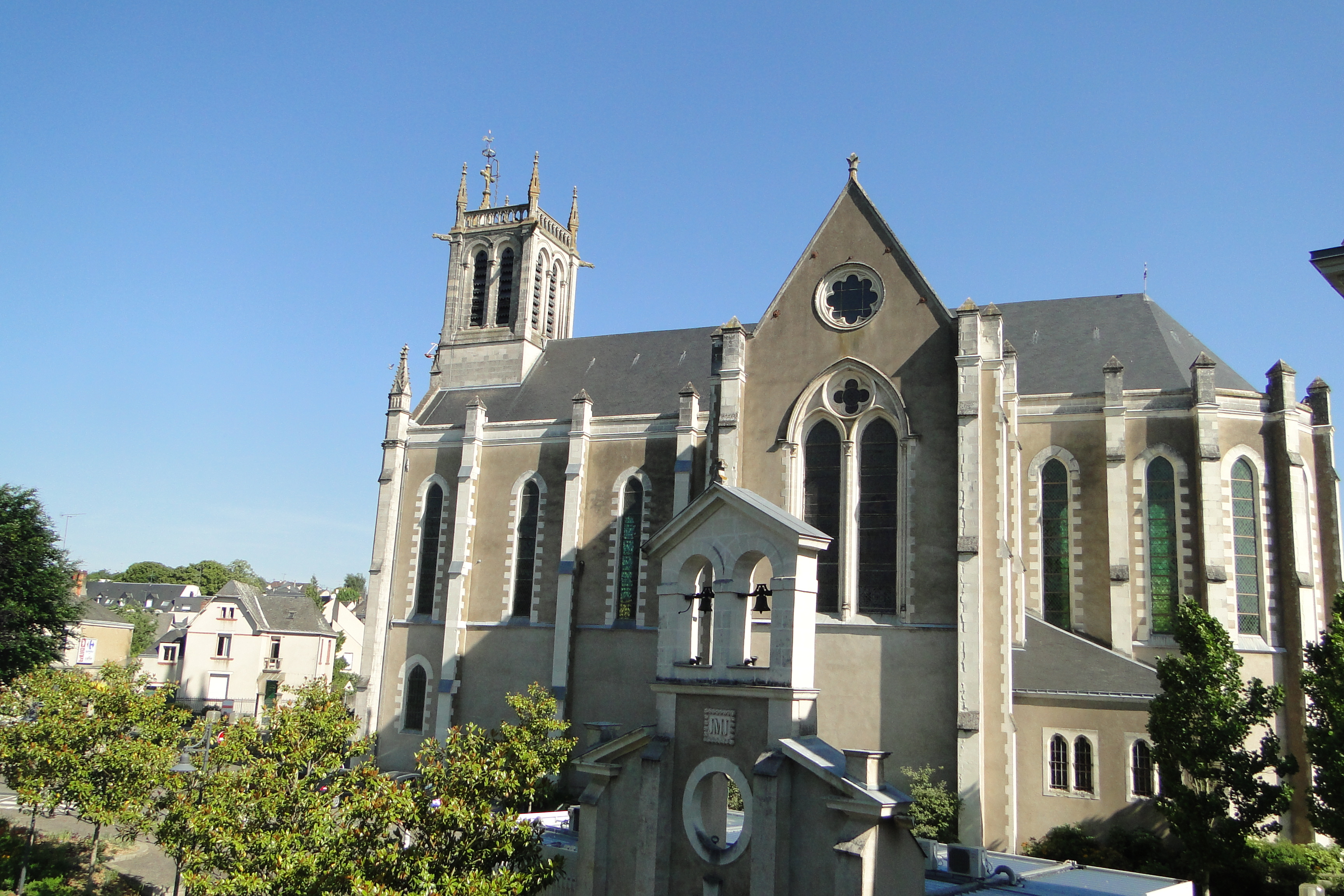 L’ancienne église paroissiale Saint-Pierre, en mauvais état et jugée trop petite, fût démolie pour laisser place à l’édifice actuel, dont la construction, commencée en 1869, ne put être achevée que 10 ans plus tard après de graves difficultés techniques, provoquées par des tassements du terrain.